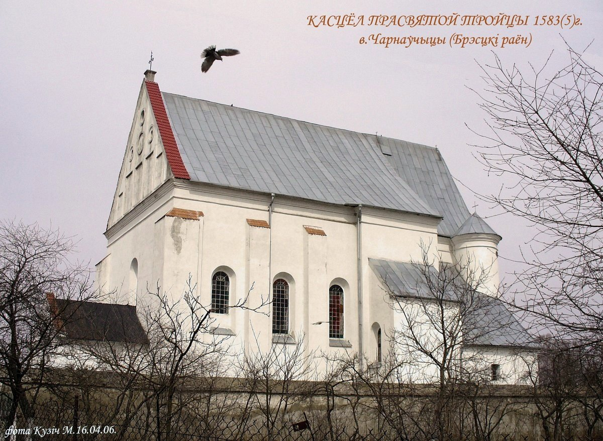 Чарнаўчыцы. Троіцкі касцёл